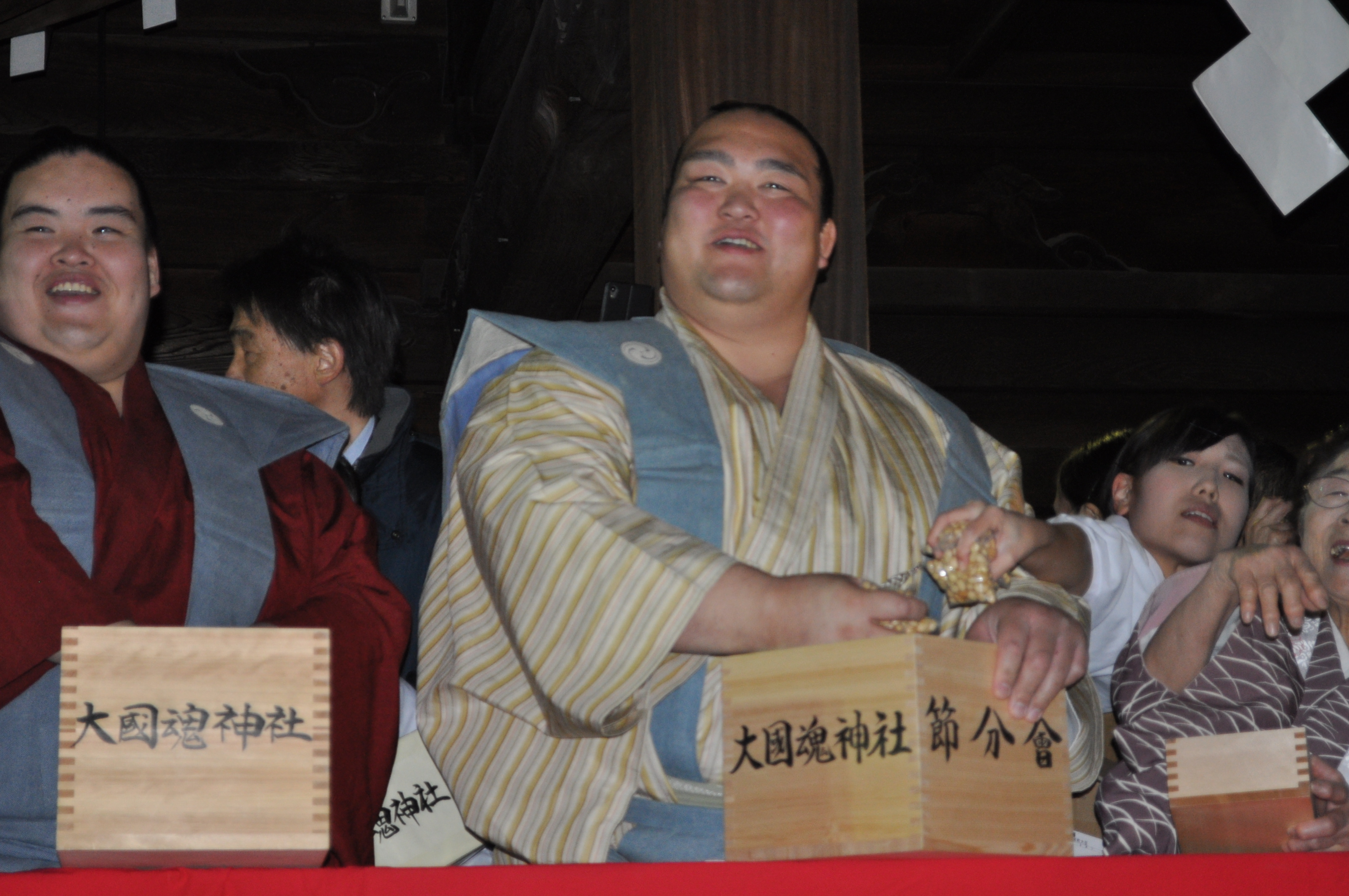 大國魂神社 稀勢の里